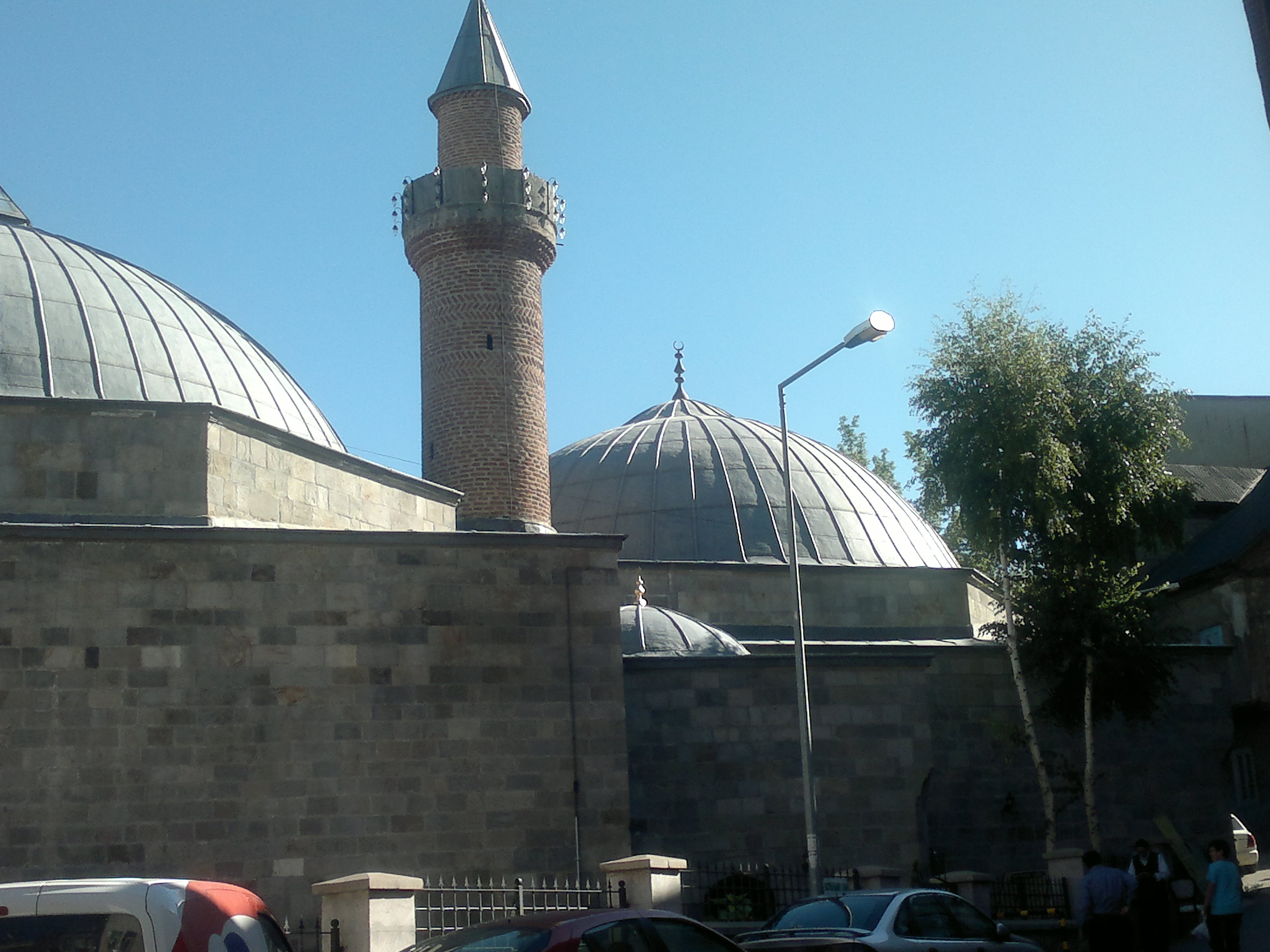 Erzurum Boyahane Camii